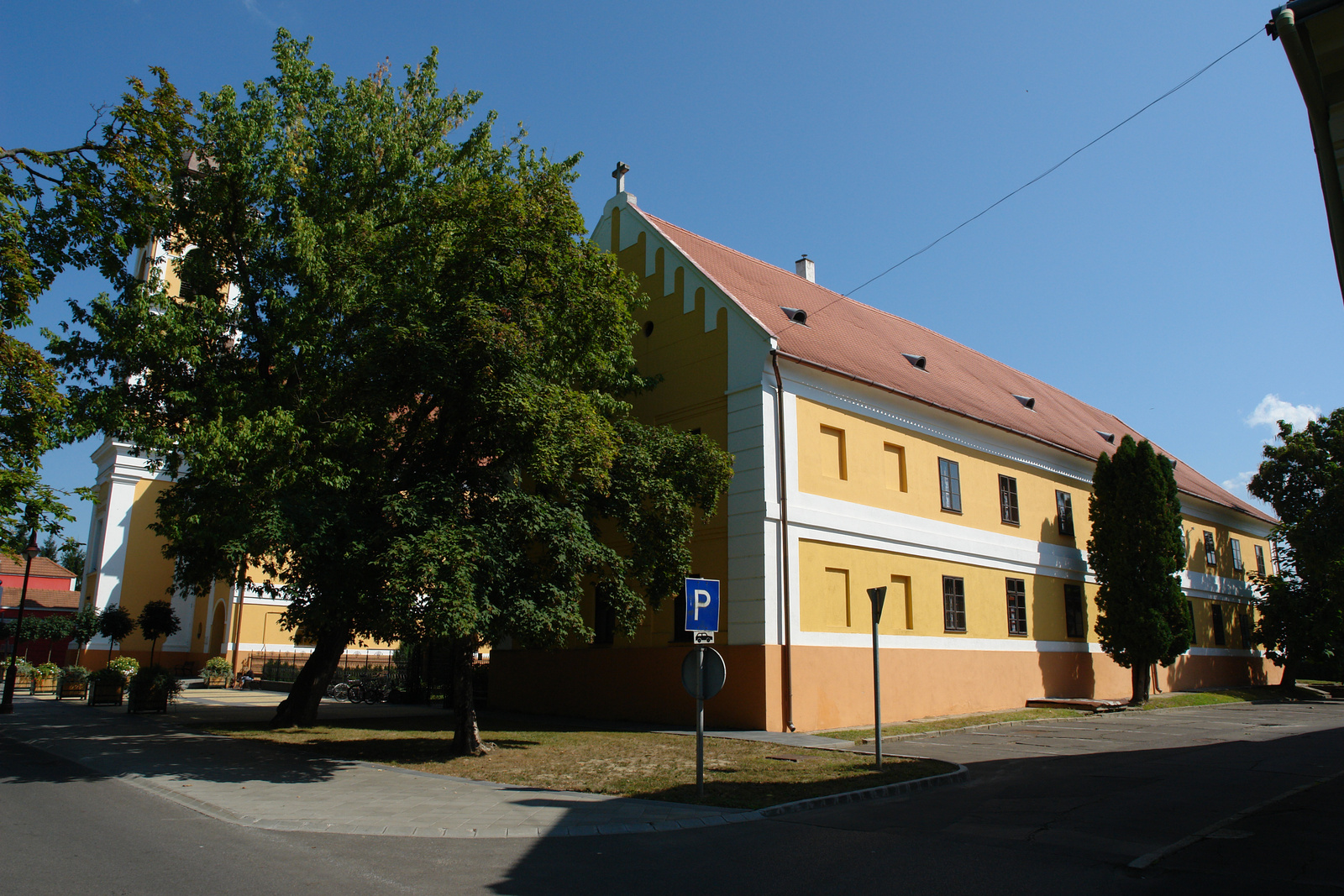 Ferences rendház (Nagyatád, Széchényi tér 6.) This is a photo of a monument in Hungary. Identifier: 8018